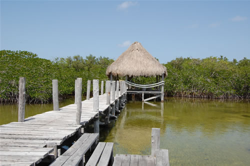 Laguna de Río Huach, con palapa, en el caribe mexicano. Costa Maya